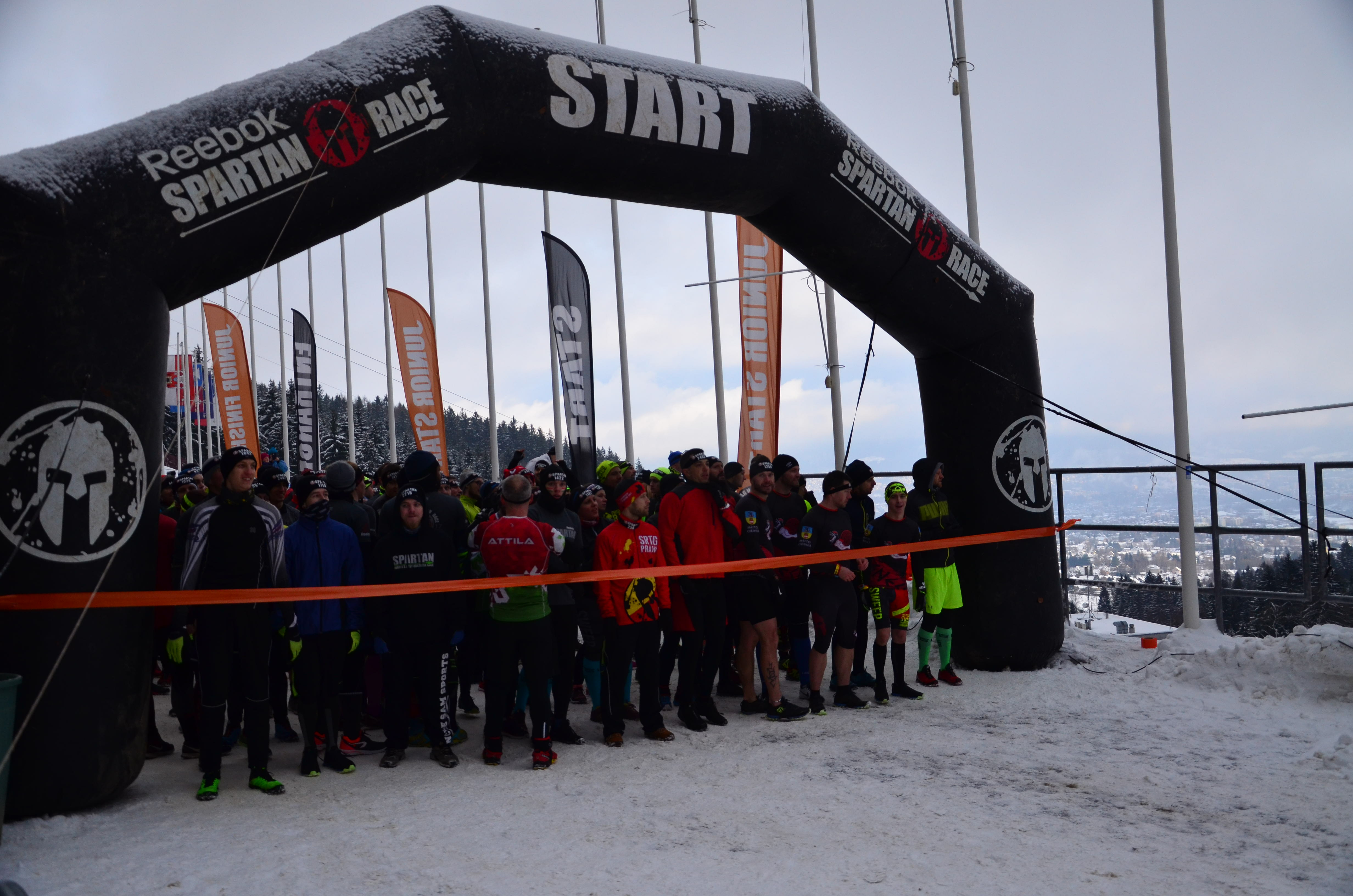 startek